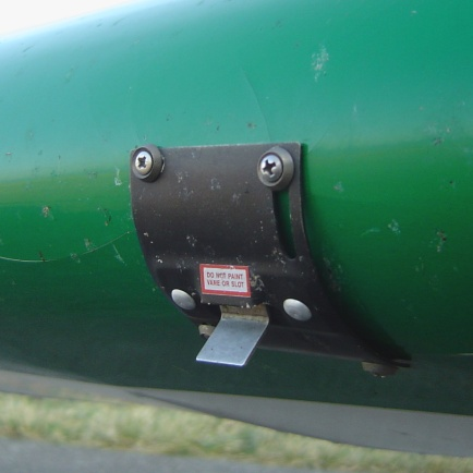 Avertisseur de décrochage d'un DR400.